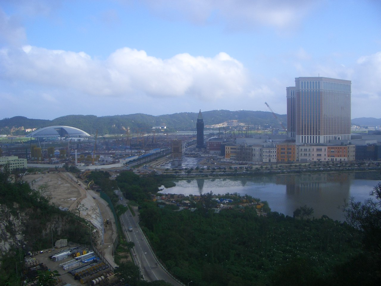 2007年路氹面貌